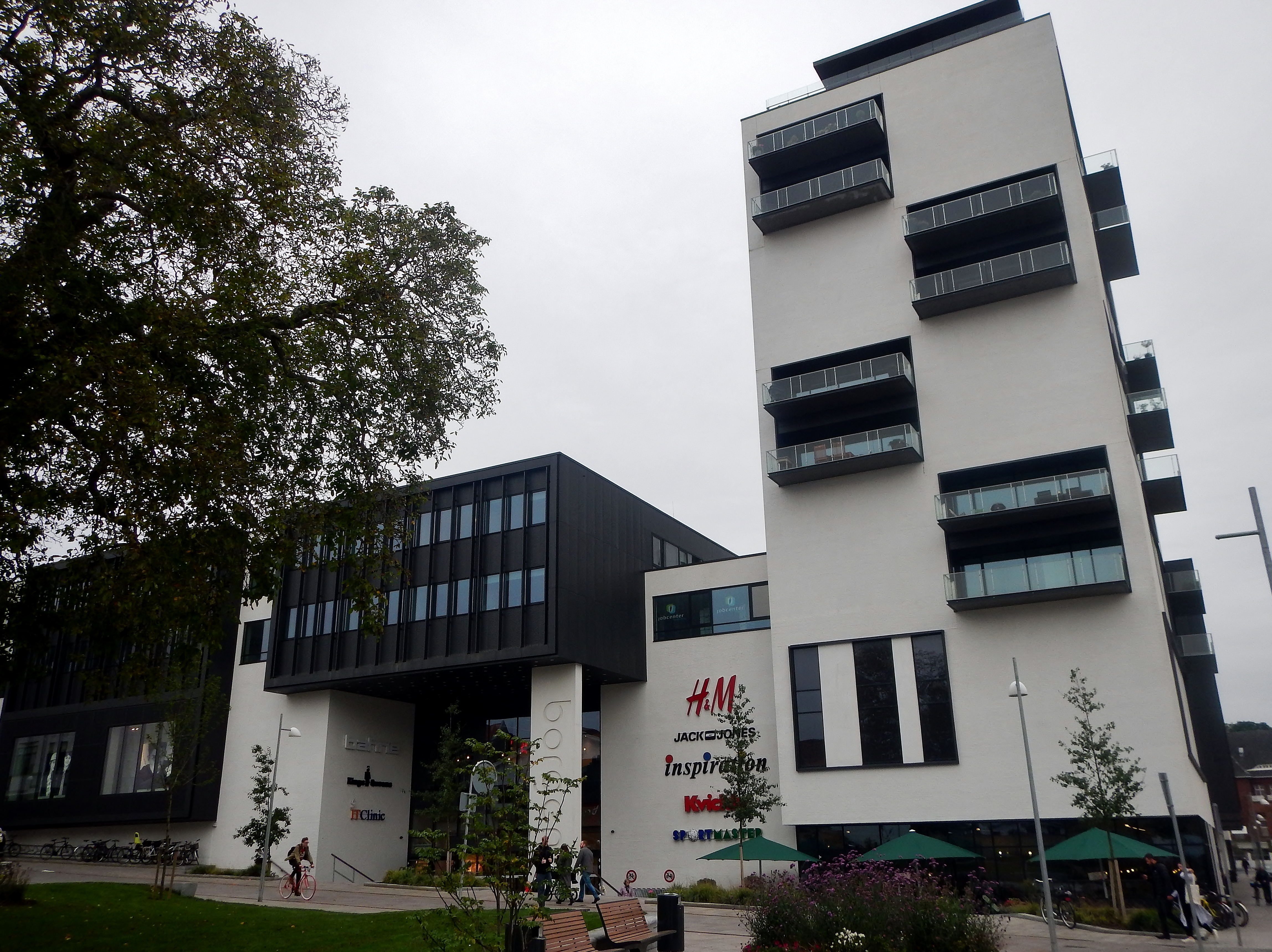 Sønderborg